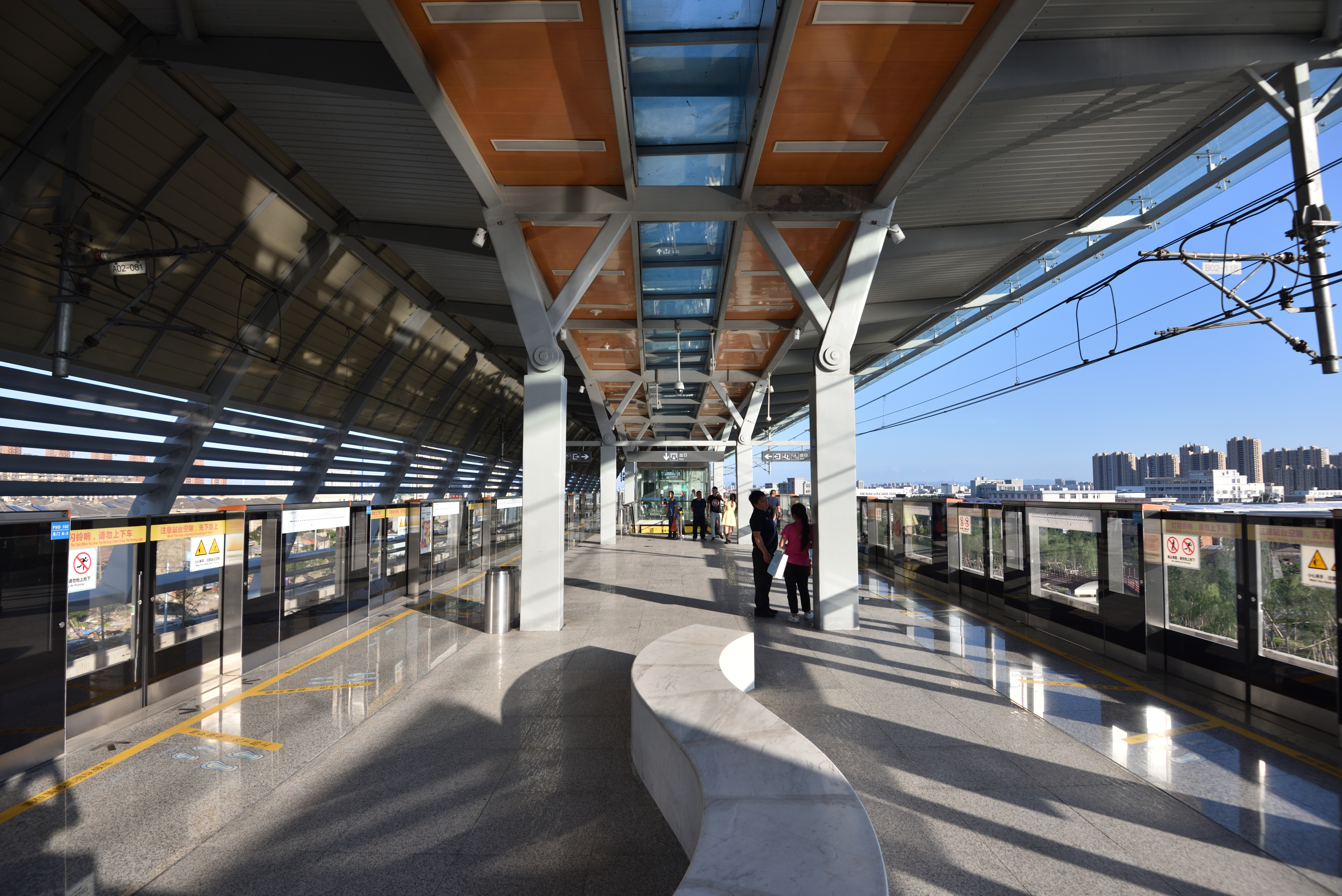 宁波地铁高桥站